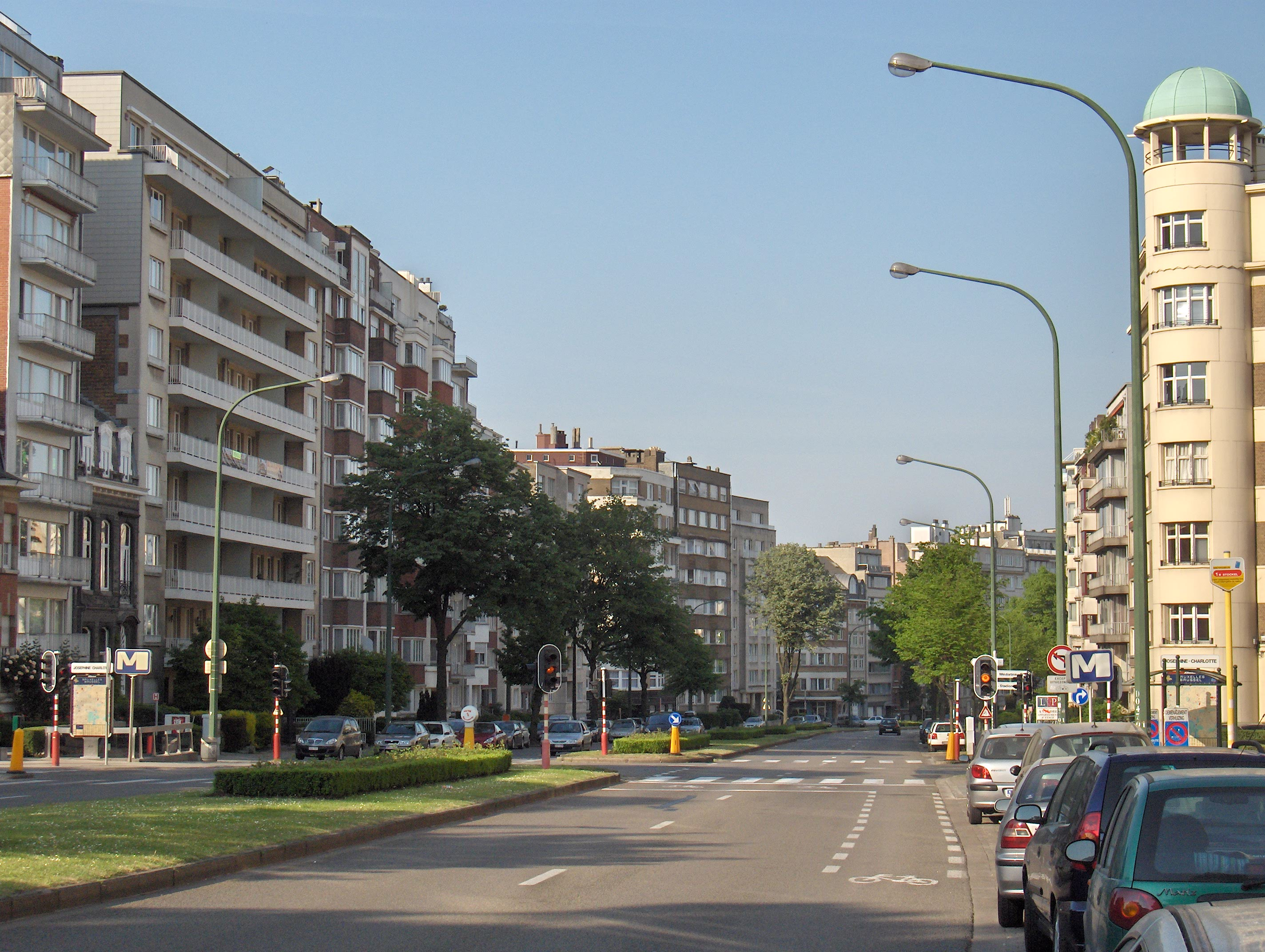 Avenue de Broqueville, Woluwe-Saint-Lambert, Brussels, Belgium